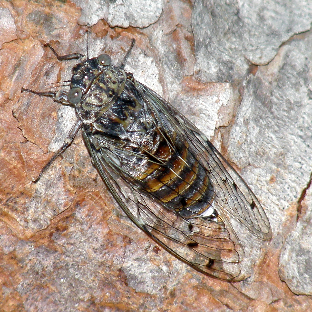 sur le tronc d'un pin. Nîmes, Gard, France.